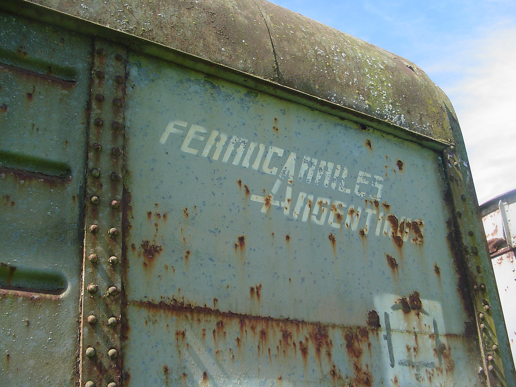 Viejo vagon de carga radiado en la estación Ignacio Correas.